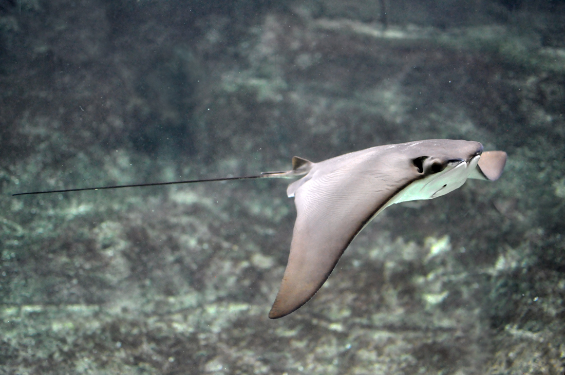 Rhinoptera_bonasus